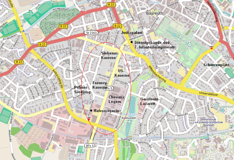 Kasernenviertel Bayreuth Karte